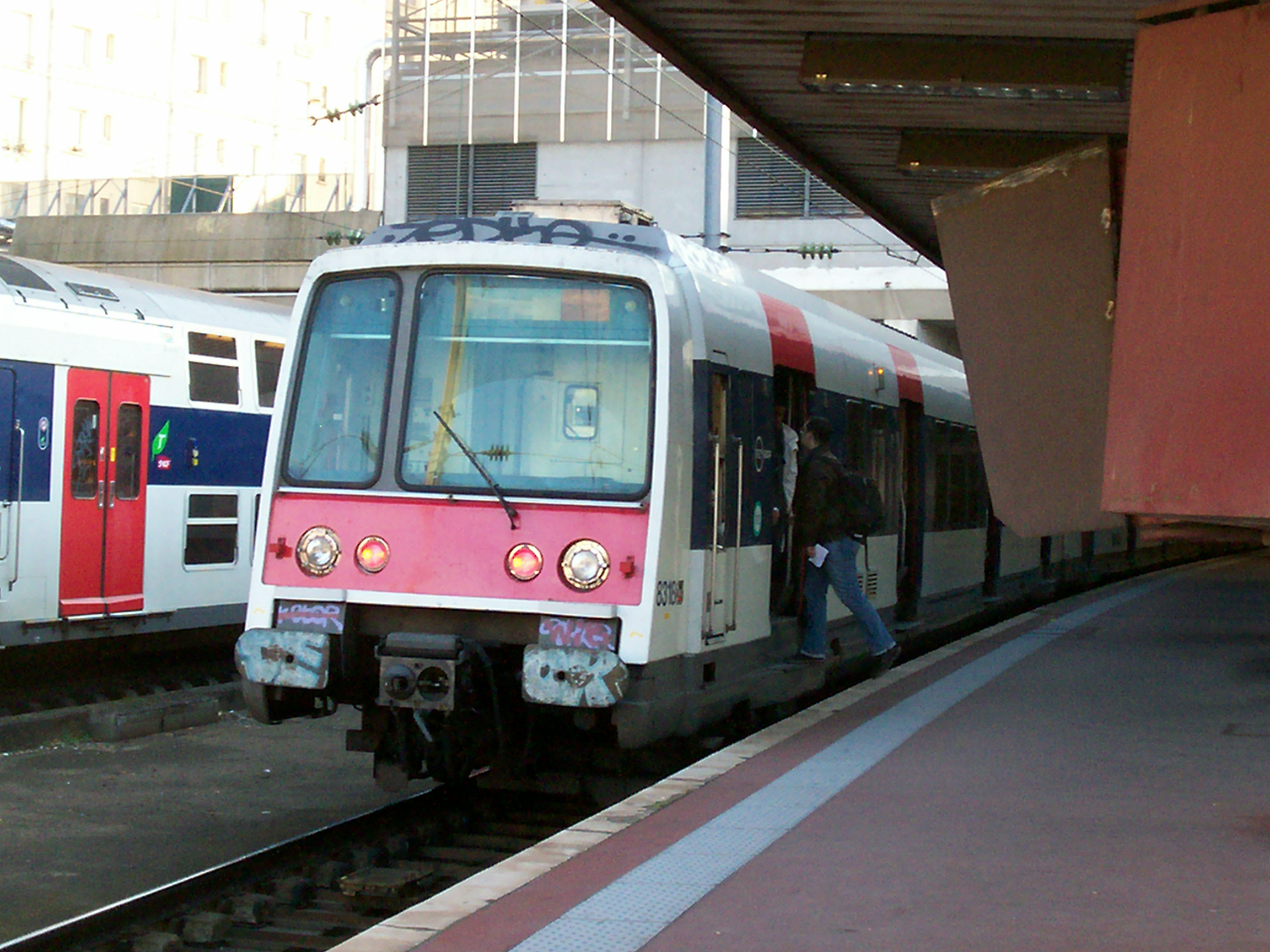 Rame MI79 en gare du Nord lors d'une rupture d'interconnexion suite au mouvement social de Novembre 2007